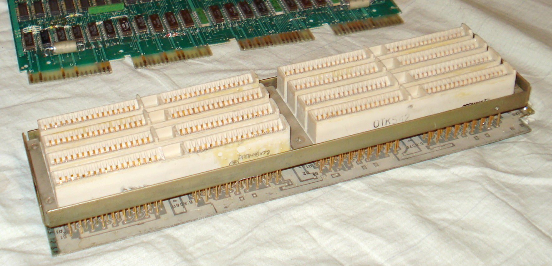 Межмодульный параллельный интерфейс